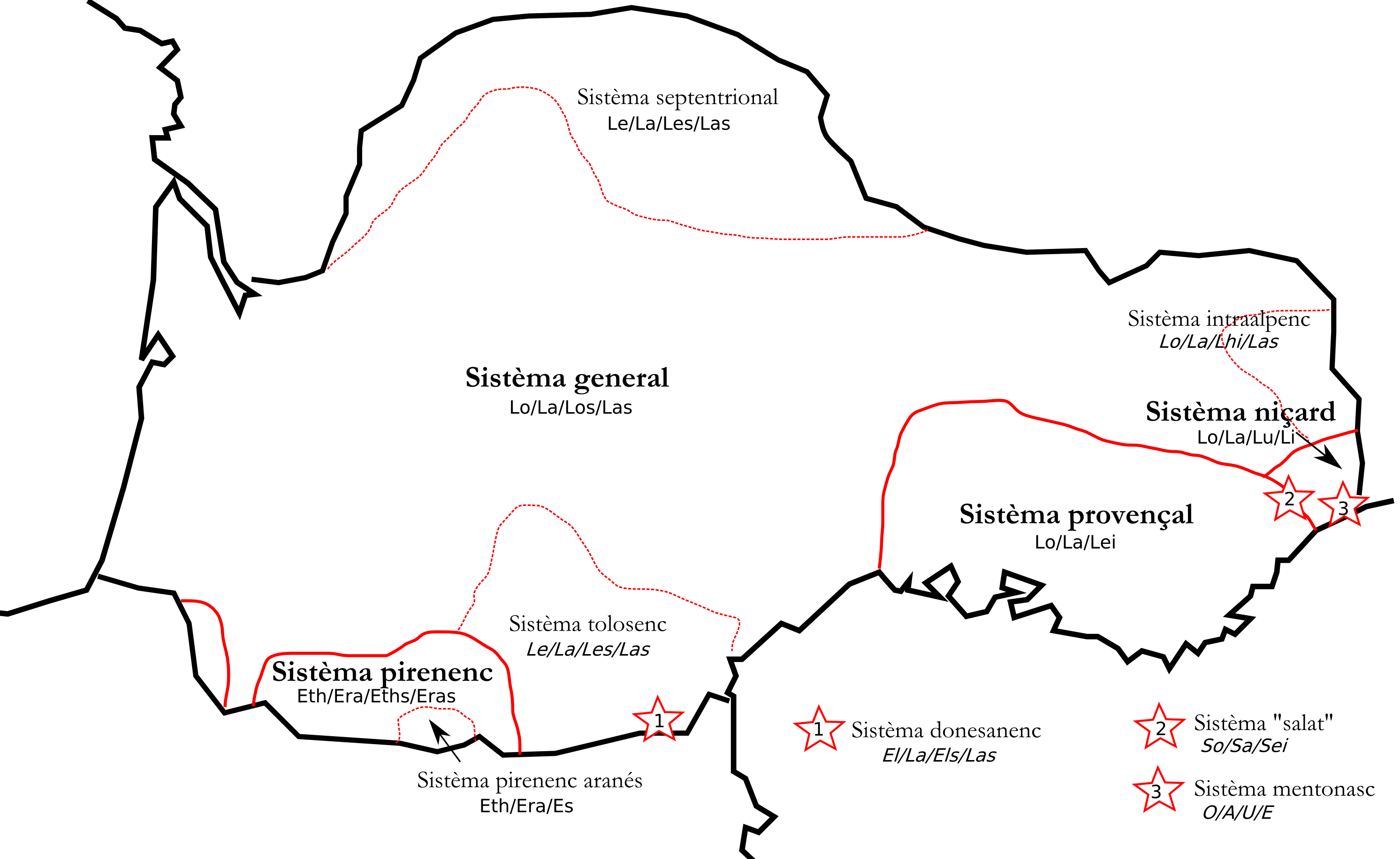 los sistèmas de l'article en occitan